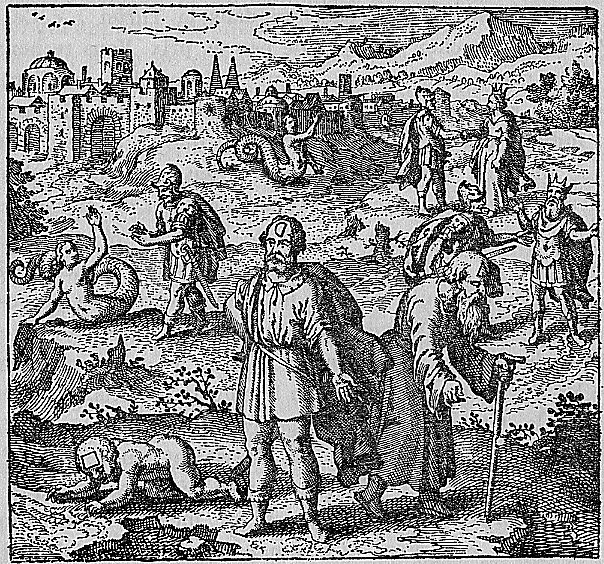 Emblem 39